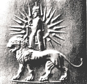 میترا و نماد شیر و خورشید